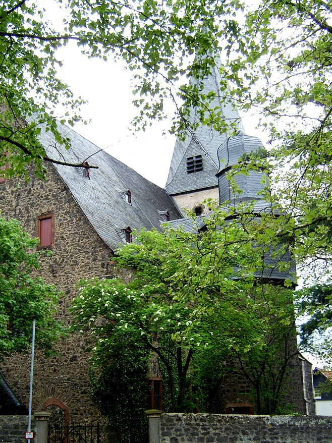 Evangelische Stadtkirche Hungen